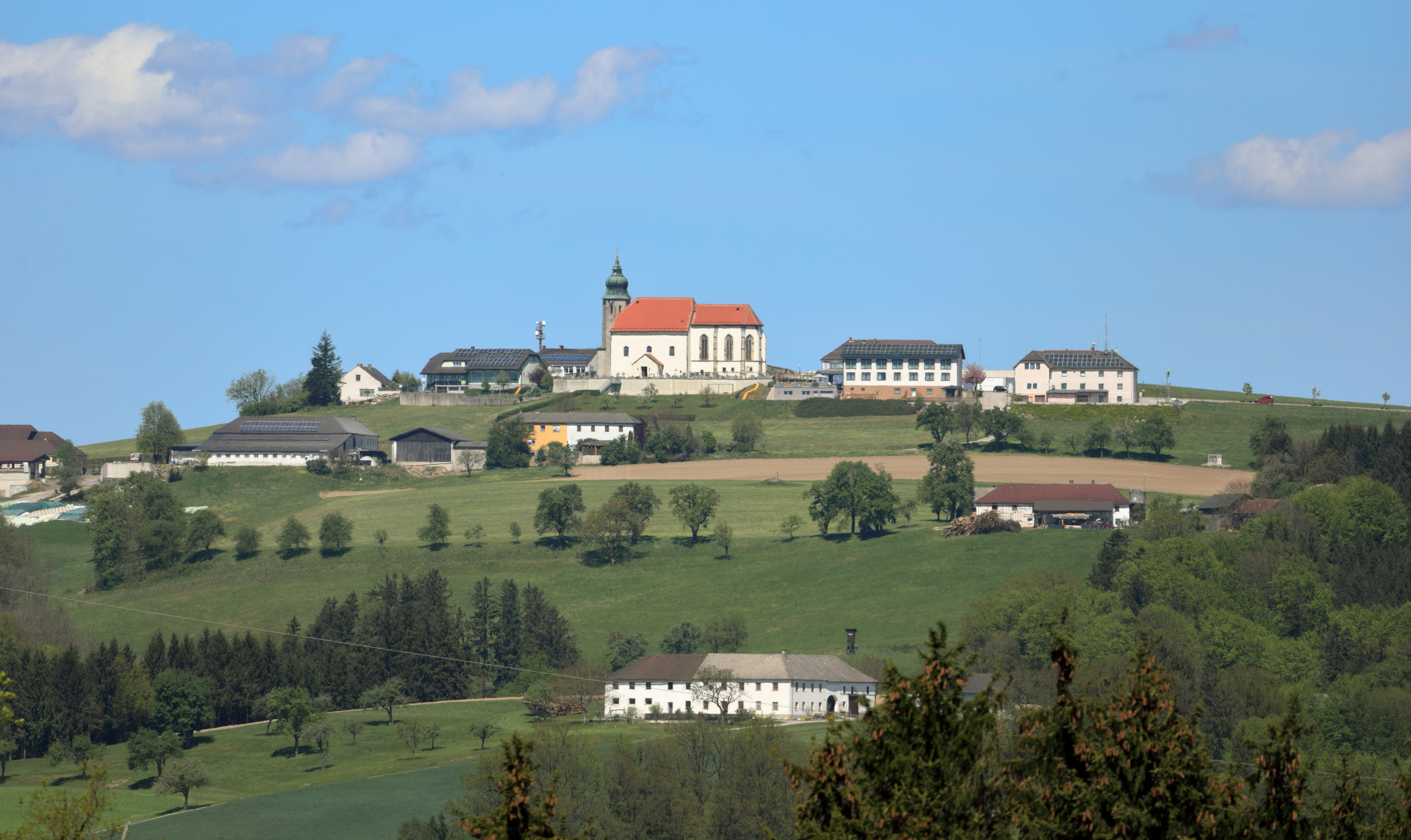 Gipfelregion des 469 Meter hohen Kollmitzberges in der niederösterreichischen Marktgemeinde Ardagger mit der weithin sichtbaren röm.-kath. Pfarr- und Wallfahrtskirche hl. Ottilie.